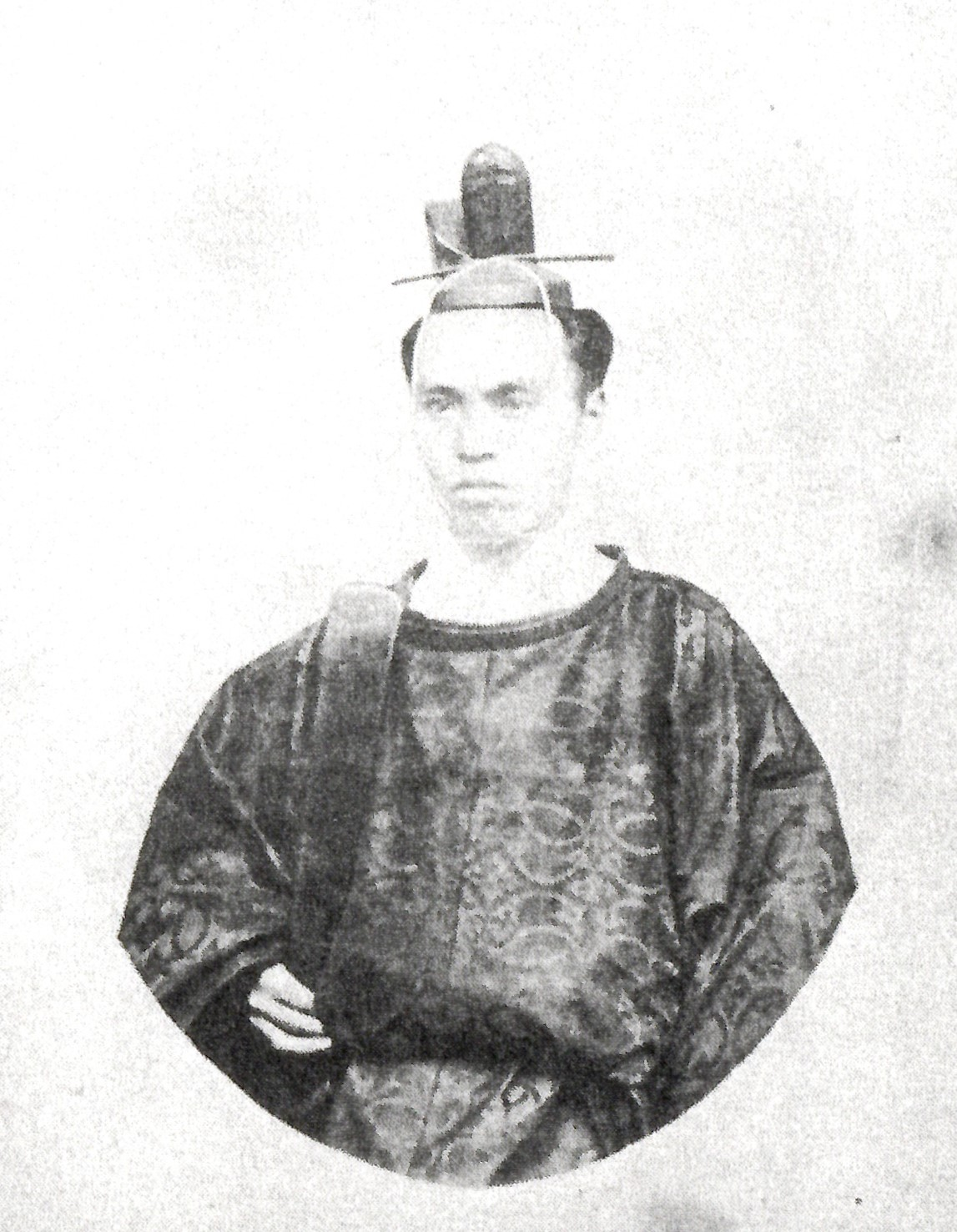 日野西光善の肖像写真。